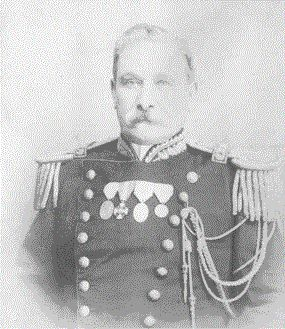 Coronel Antonio Susini